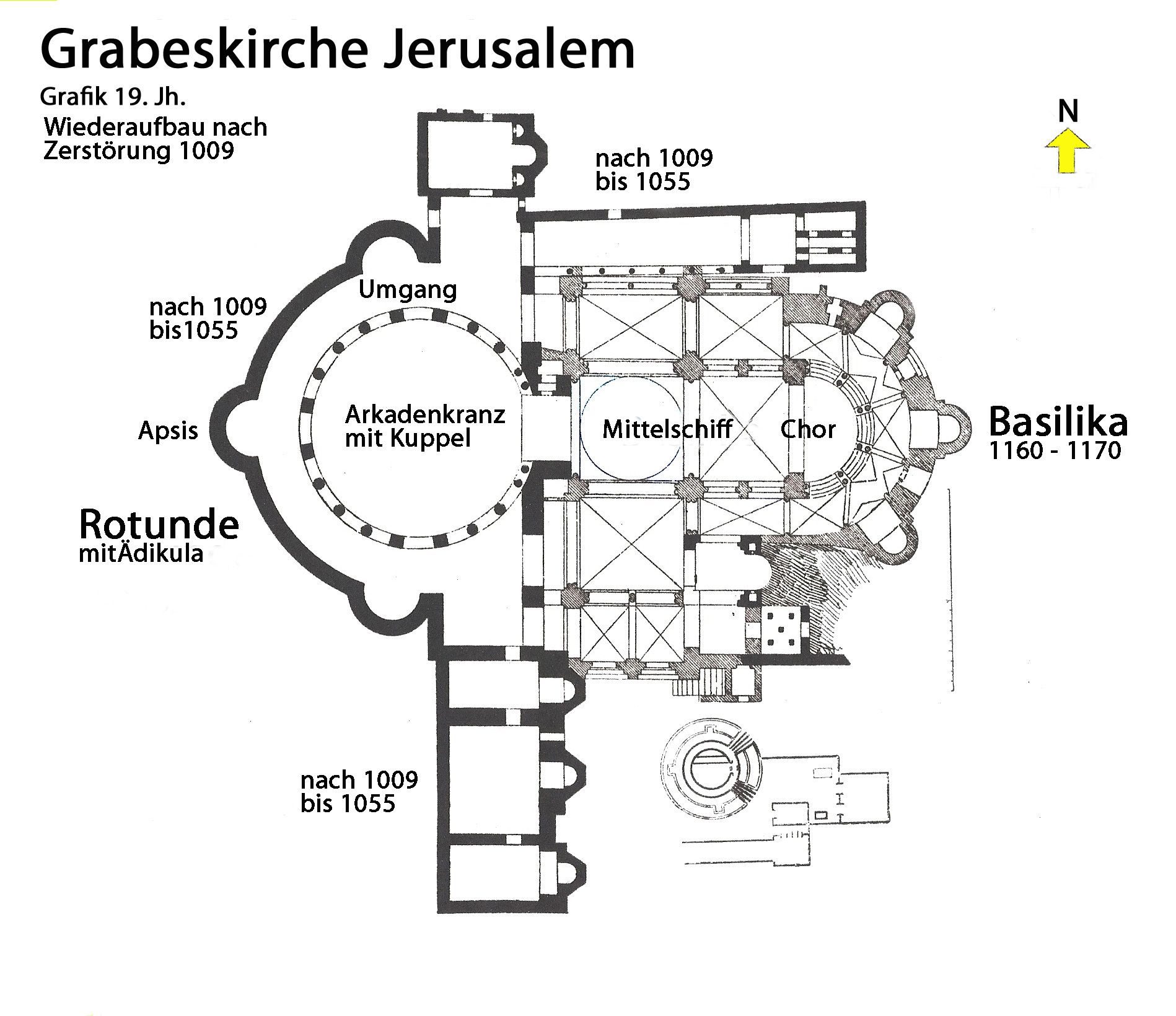 Grabeskirche Jerusalem, Wiederaufbau nach Zerstörung von 1009, Grafik 19. Jh.